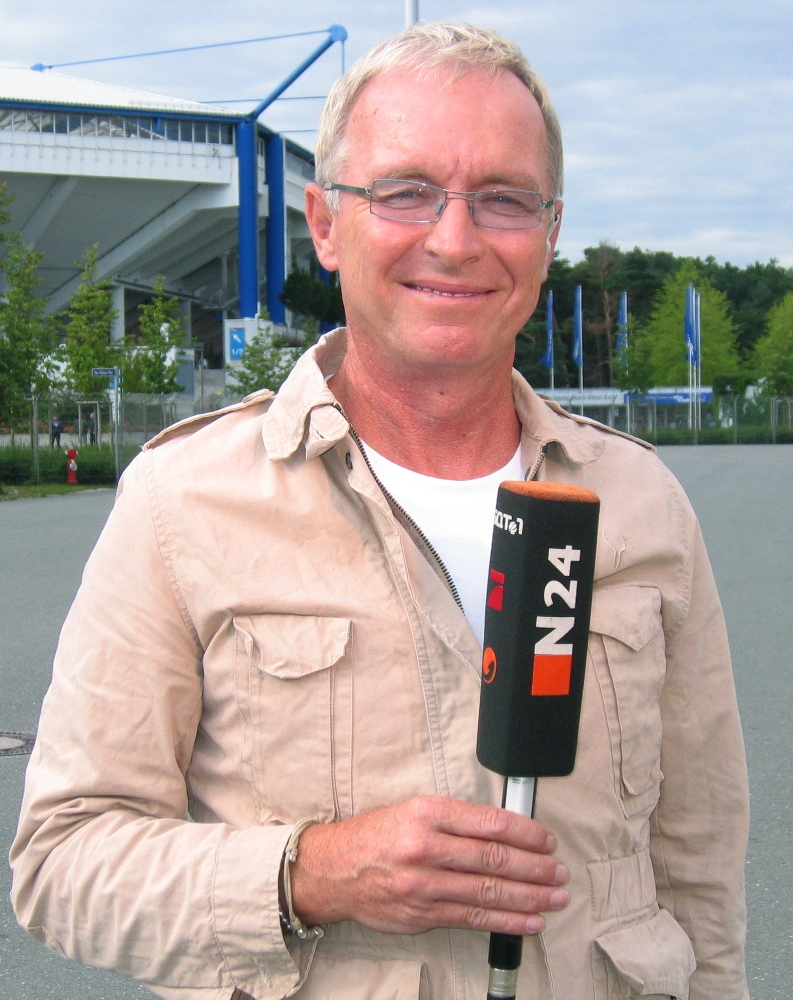 Uli Köhler, Sport-Reporter, Vor dem easyCredit Stadion in Nürnberg